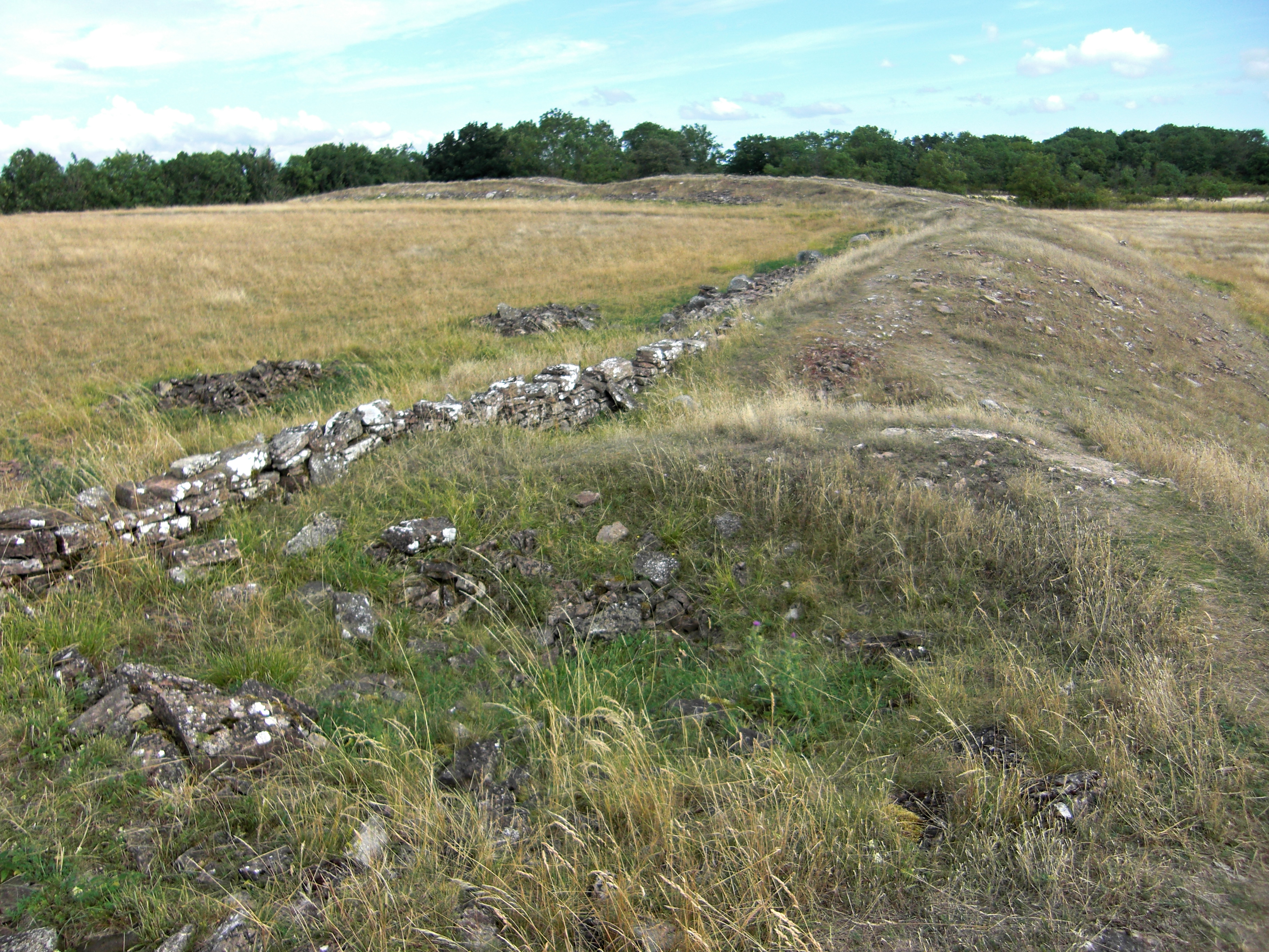 Bårby borg (Raä-nr Mörbylånga 17:1) ligger vid landsborgsbranten i Mörbylånga socken, Mörbylånga kommun, Öland, Kalmar län, Sverige. Borgen användes från folkvandringstid och ända fram till 1600-talet.